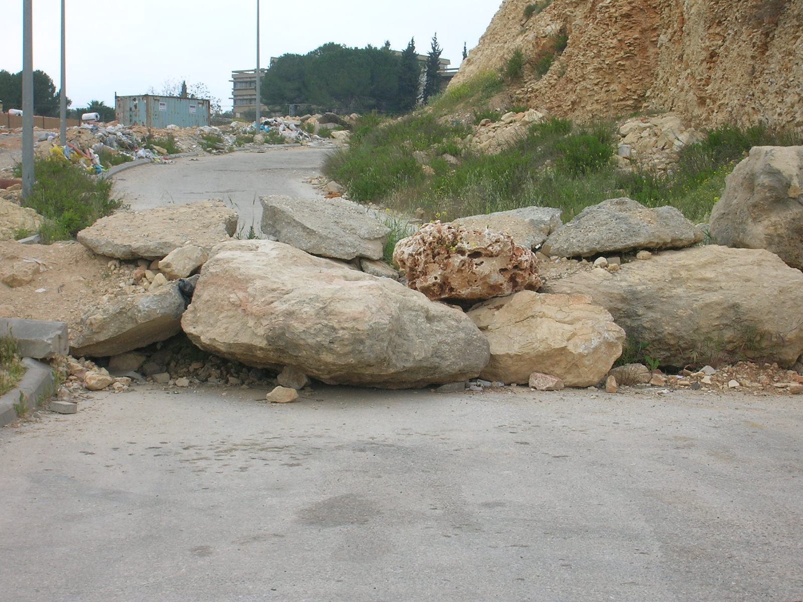 Blocked Path